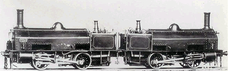 Locomotiva "Mastodonte dei Giovi", data: ca. 1860